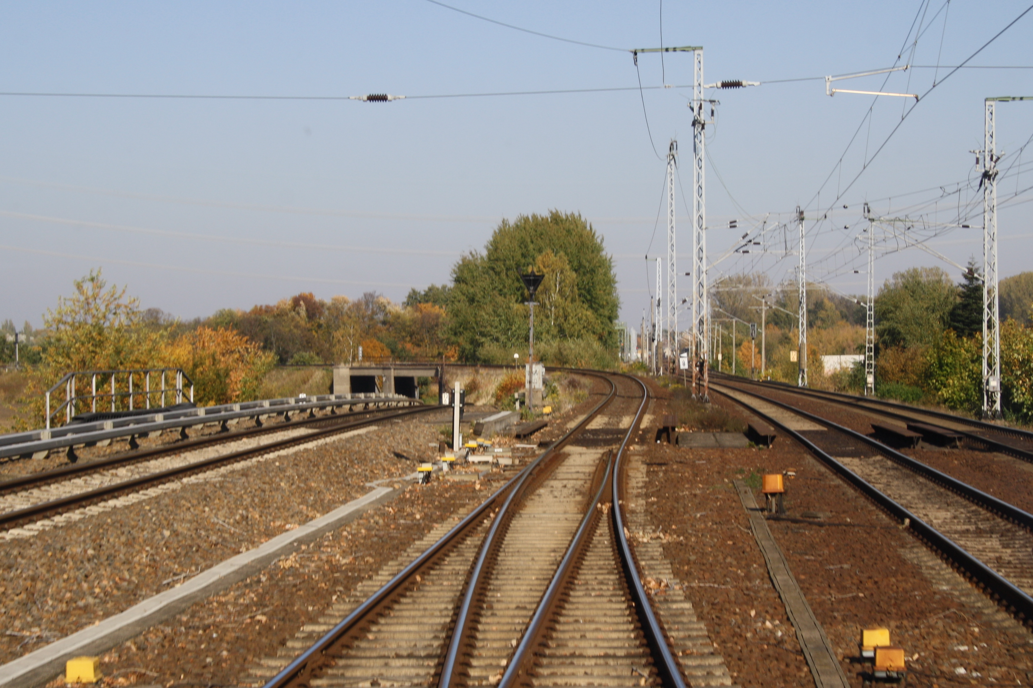 Abzweig Berlin-Karow der Bahnstrecke Berlin-Karow–Fichtengrund